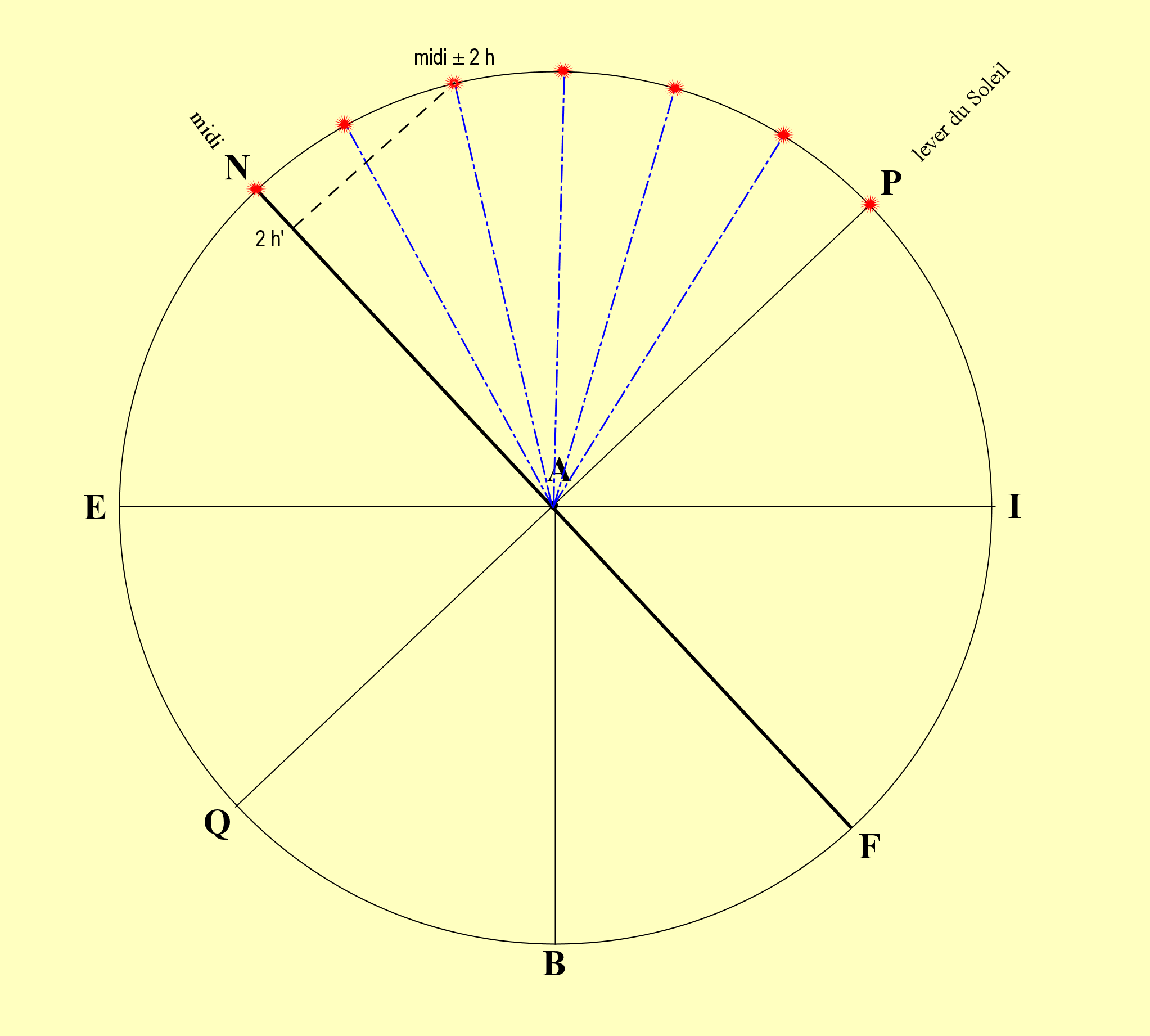 Représentation sur l'analemme d'heures équinoxiales.